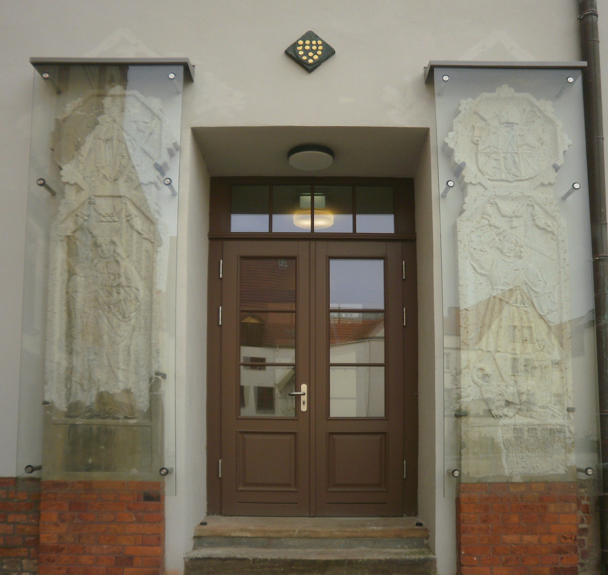 Wappensteine der Familie von Bülow angebracht an der Außenwand des Hofanbaus des Hauptgebäude der Universität Rostock